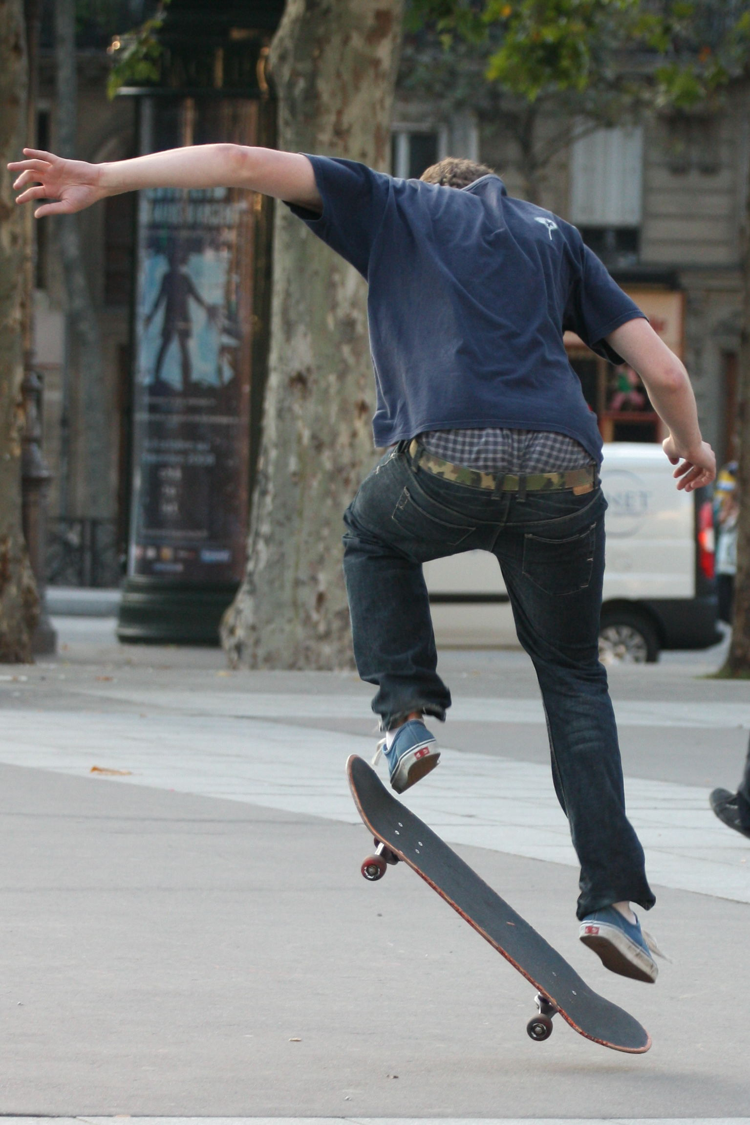 Skate and BMX - Place de la Bastille - Paris - 29 Aout 2008